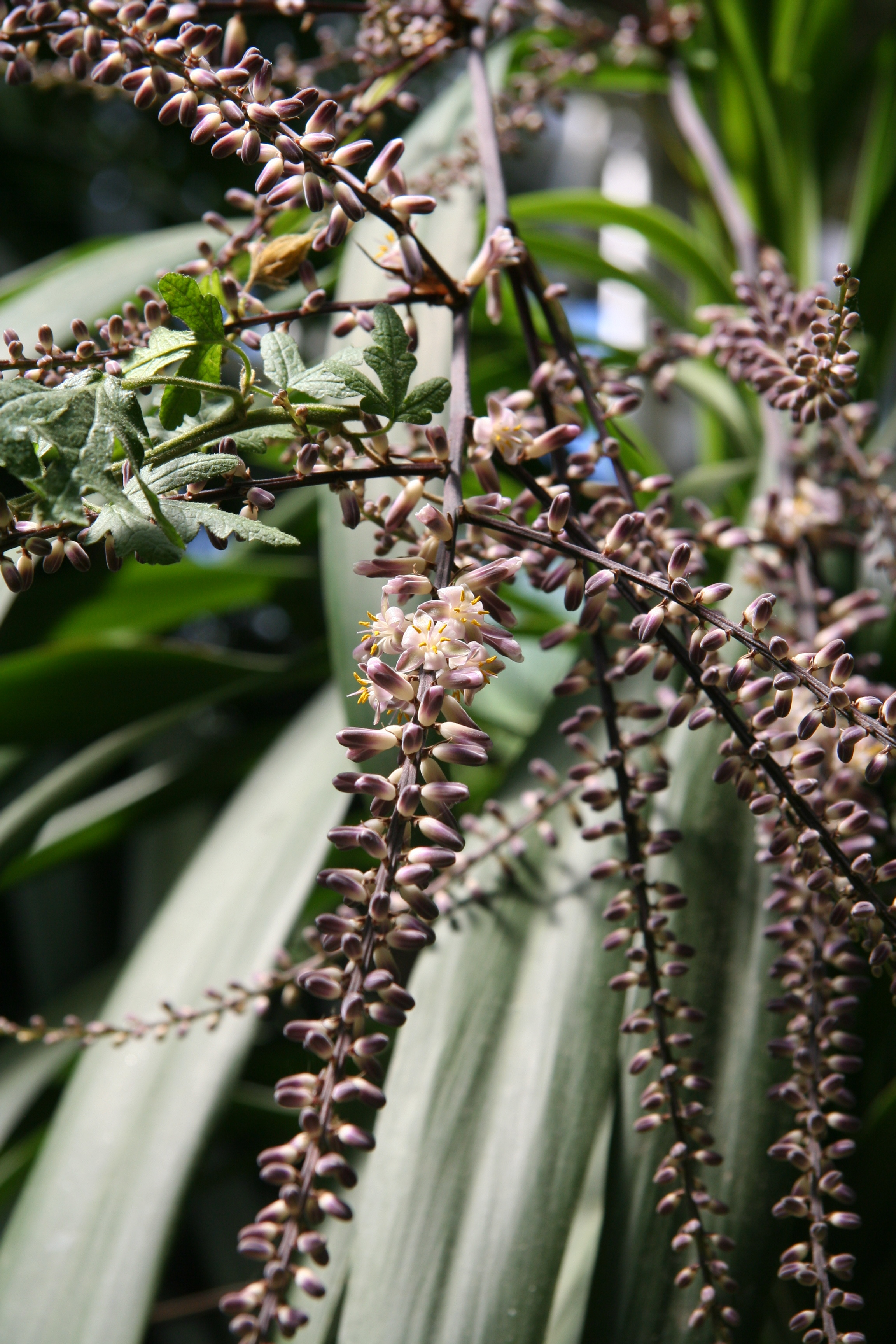 Cordyline stricta im Botanischen Garten Berlin